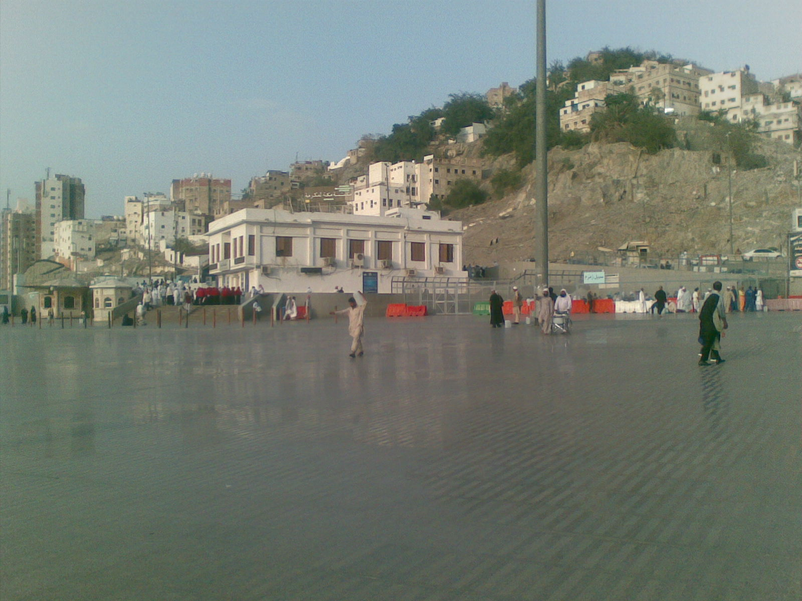 മക്കയില്‍ നബിയുടെ ജന്മ ഗ്രഹത്തിനടുത്തുള്ള മല